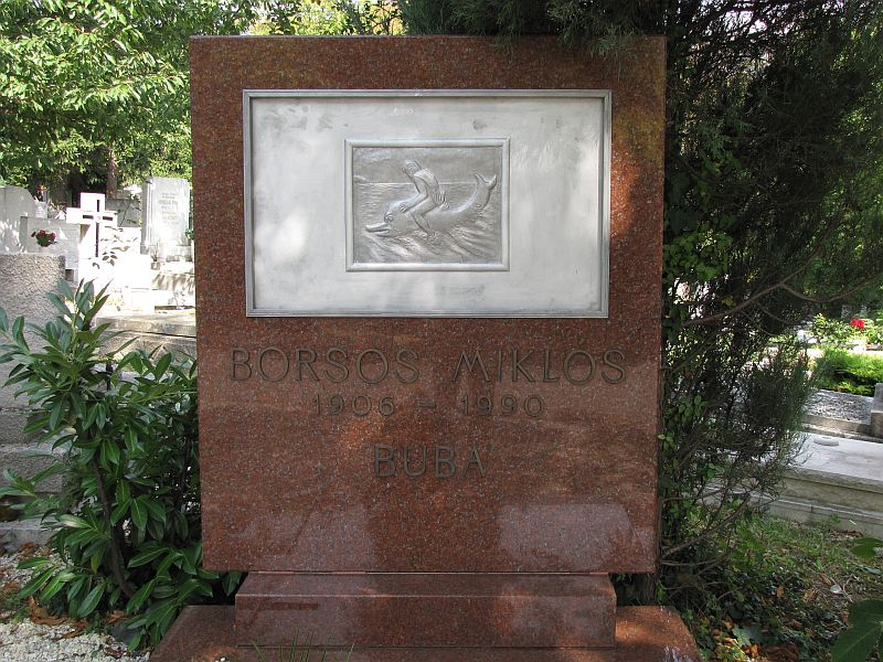 Borsos Miklós (Nagyszeben, 1906. augusztus 13. – Budapest, 1990. január 27.) szobrász, főiskolai tanár sírja 2009-ben. Farkasréti temető: 20/2-1-929/930 [szobrász: Kampfl József]